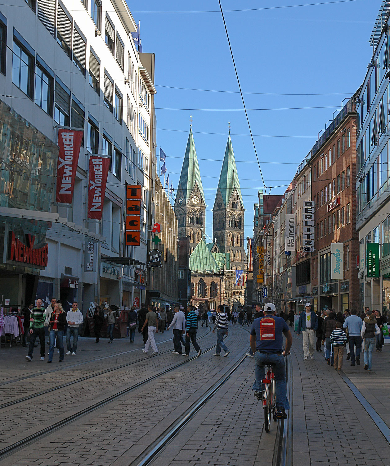 Obernstraße in Bremen mit Blick auf den St. Petri-Dom